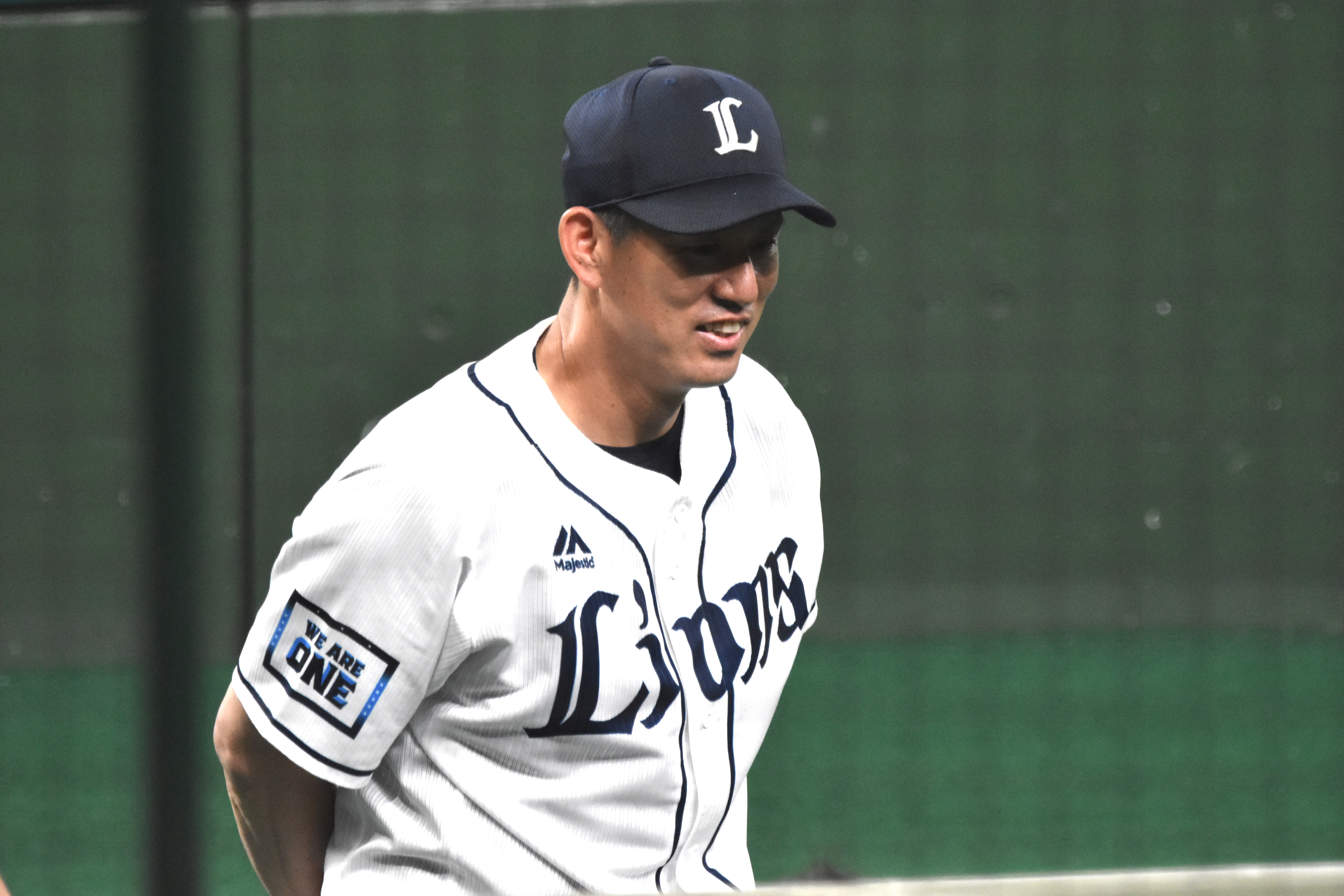 豊田清 2020年